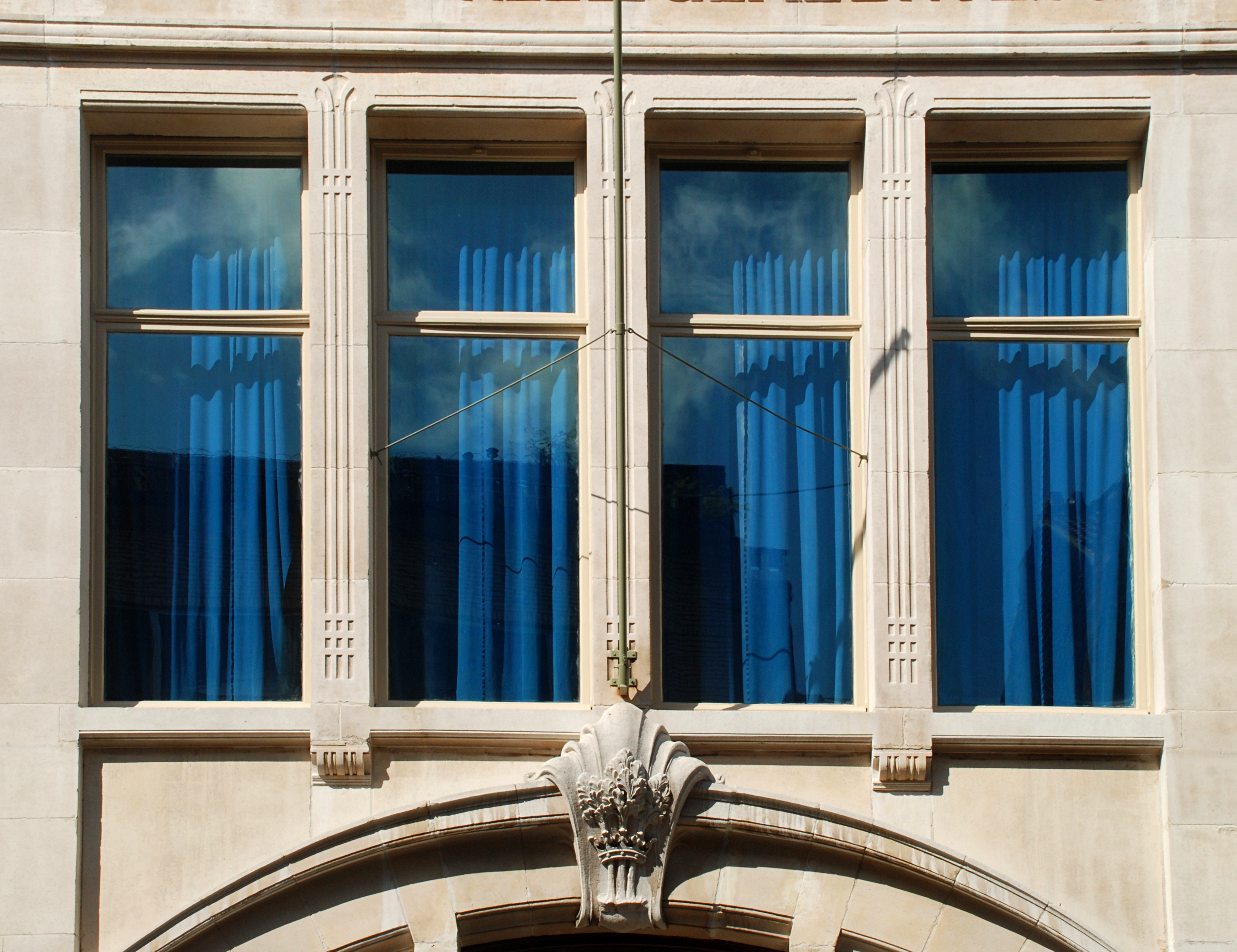 Belgique - Bruxelles - École Rodenbach (Art nouveau - architecte Henri Jacobs - 1905-1911)